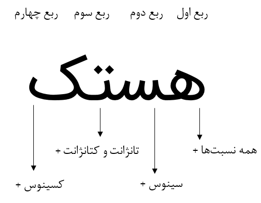 تعیین علامت هر ربع مثلثاتی